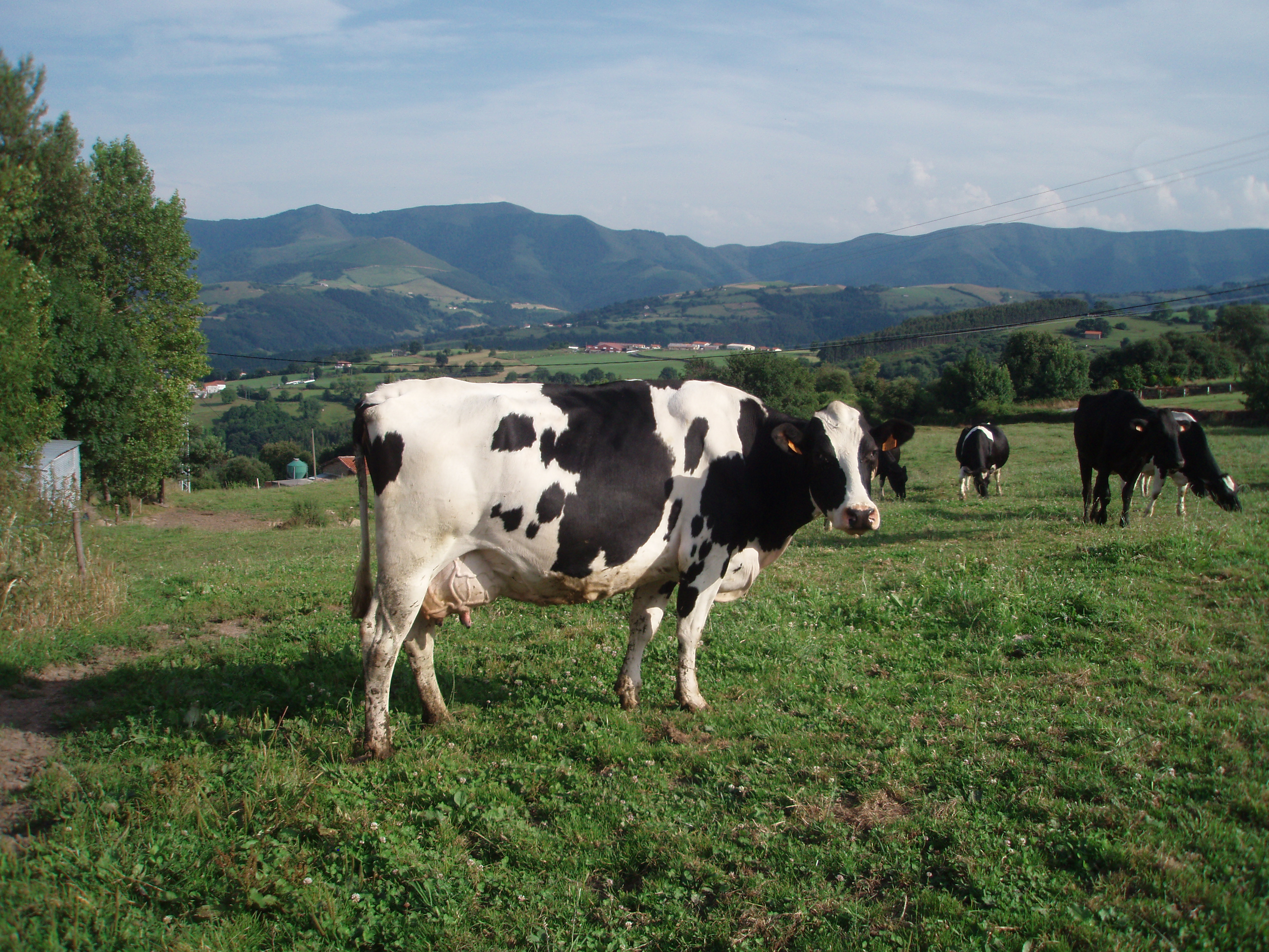 Behi frisiar hazienda Karrantza Haranako Matienzo auzoko Vista Alegre baserriko belardietan.